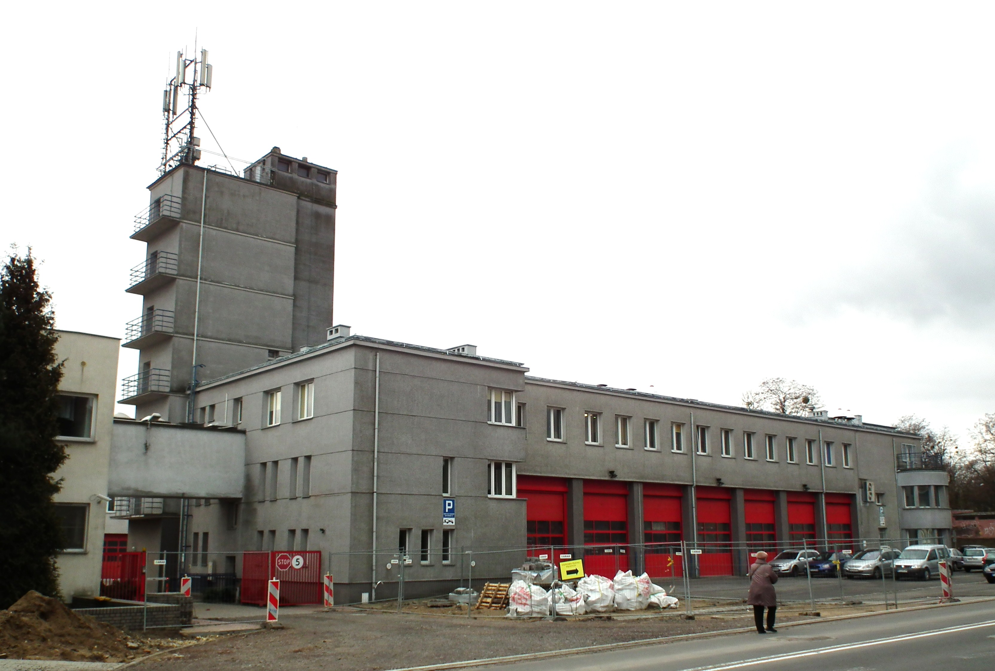 Szkoła Aspirantów Pożarnictwa w Poznaniu na ul. Czechosłowackiej.